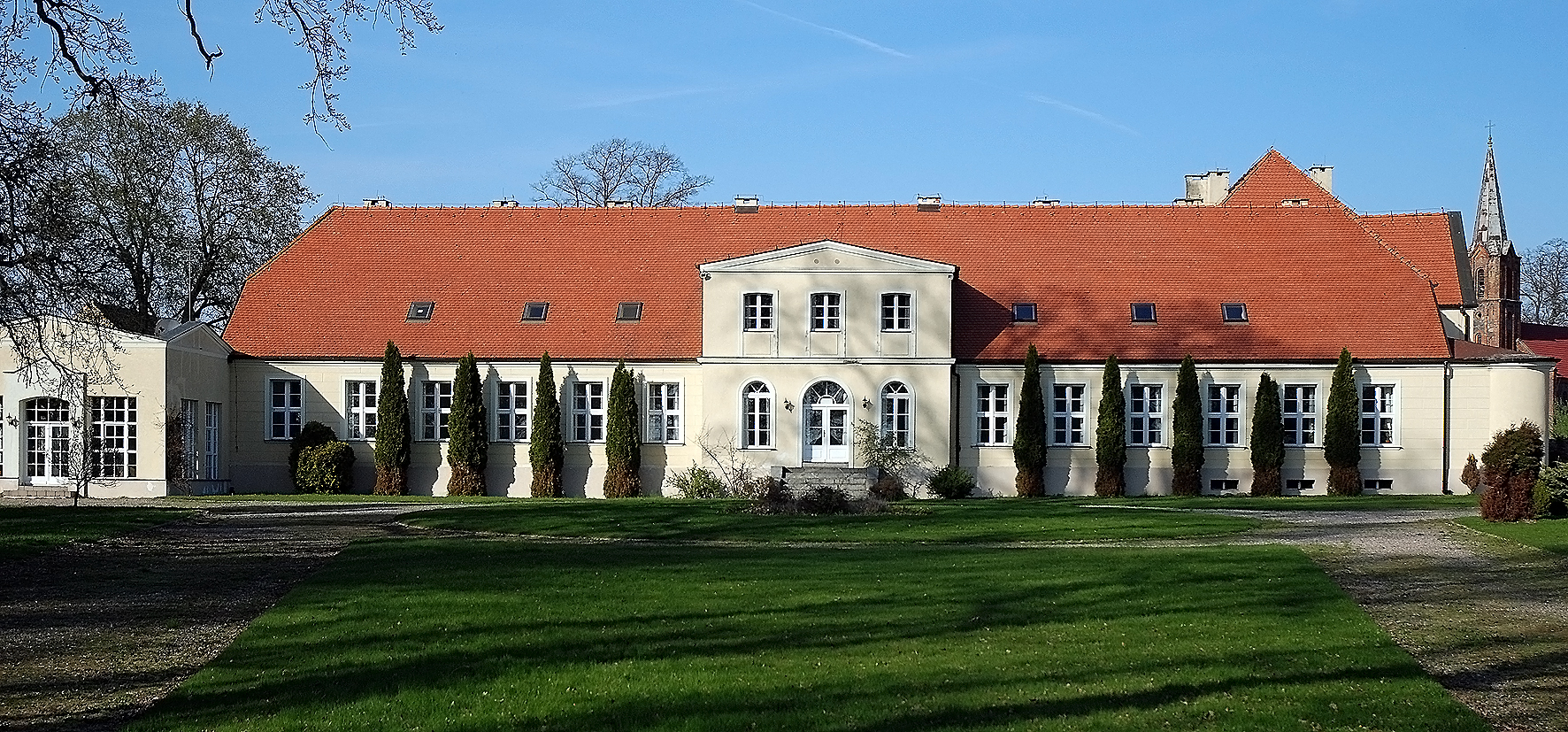 Dwór w Kulicach